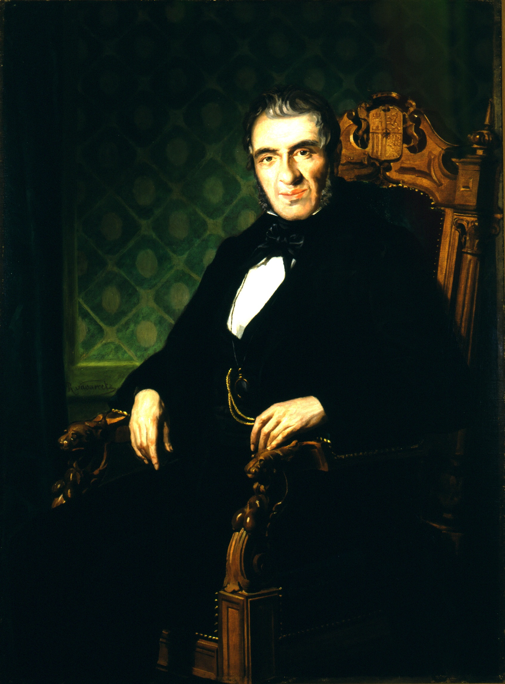 Retrato del abogado, diplomático y político español Agustín de Argüelles Álvarez (1776-1844). Esta obra preside la Sala de Reuniones del Congreso de los Diputados a la que da nombre.